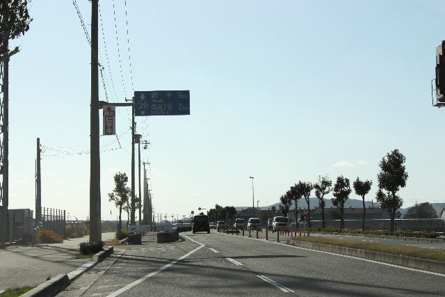 Hyogo Prefectural Road 29